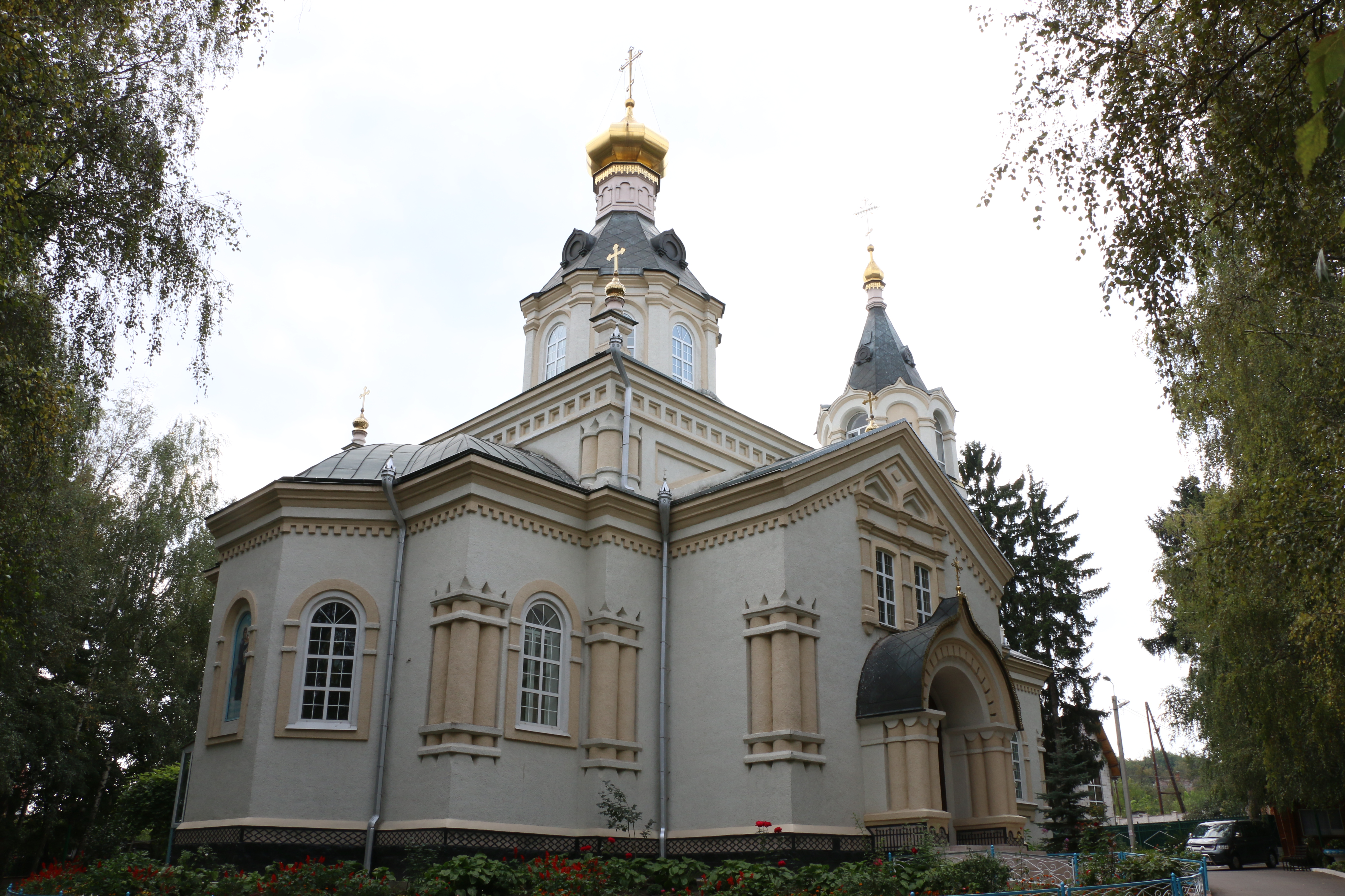 Церква Різдва Богородиці, Вінниця, вул. Богуна І.,123/1